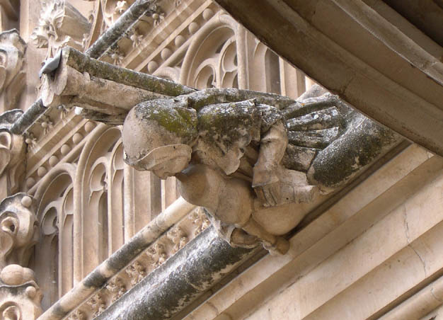 Gárgola que representa a un gaitero. Claustro de San Juan de los Reyes, en Toledo (España).